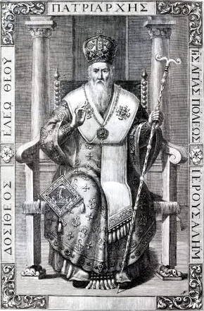 Патриарх Иерусалимский Досифей (Нотара)